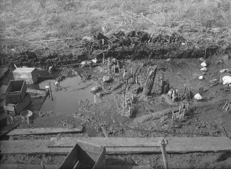 1916 års schakt. Rutorna C5c - C7a från Ö. Rutorna B4b - B5d i förgrunden. Motiv: Alvastra pålbyggnad Nyckelord: Riksintressen Kategori: Boplats 1916 års schakt. Rutorna C5c - C7a från Ö. Rutorna B4b - B5d i förgrunden.